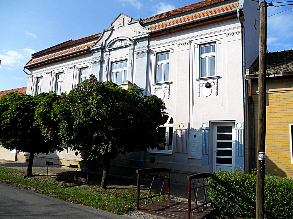 Zgrada Matice slovačke u Srbiji